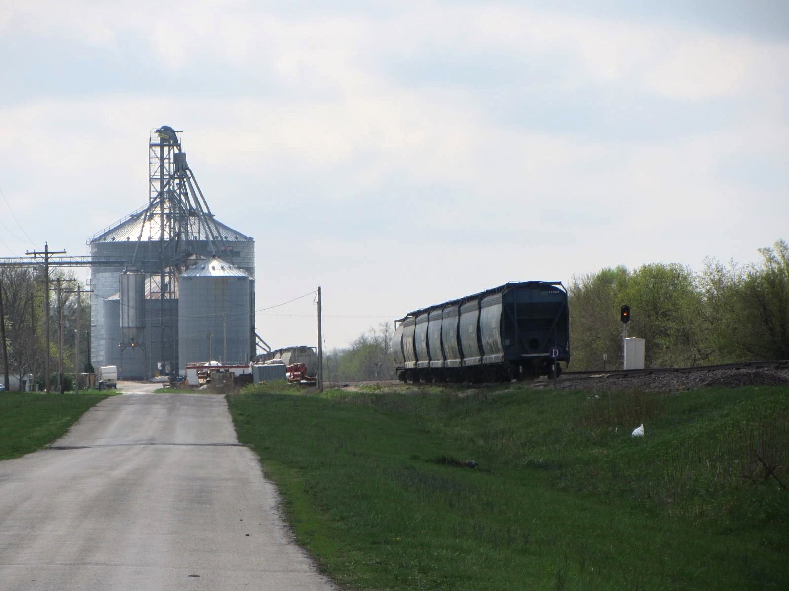 Pittwood, Illinois